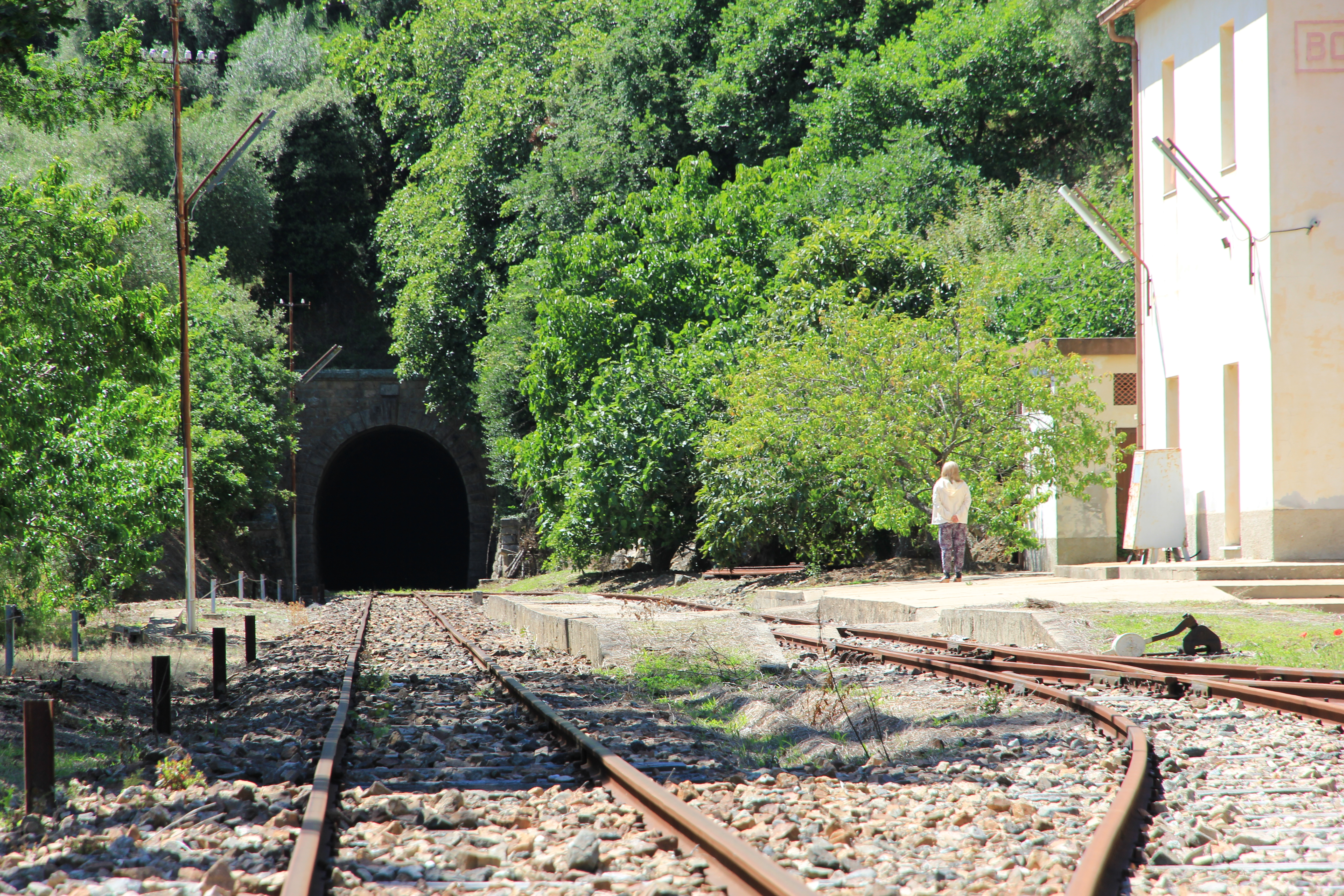 Bortigiadas - Stazione ARST (ex Ferrovie della Sardegna)